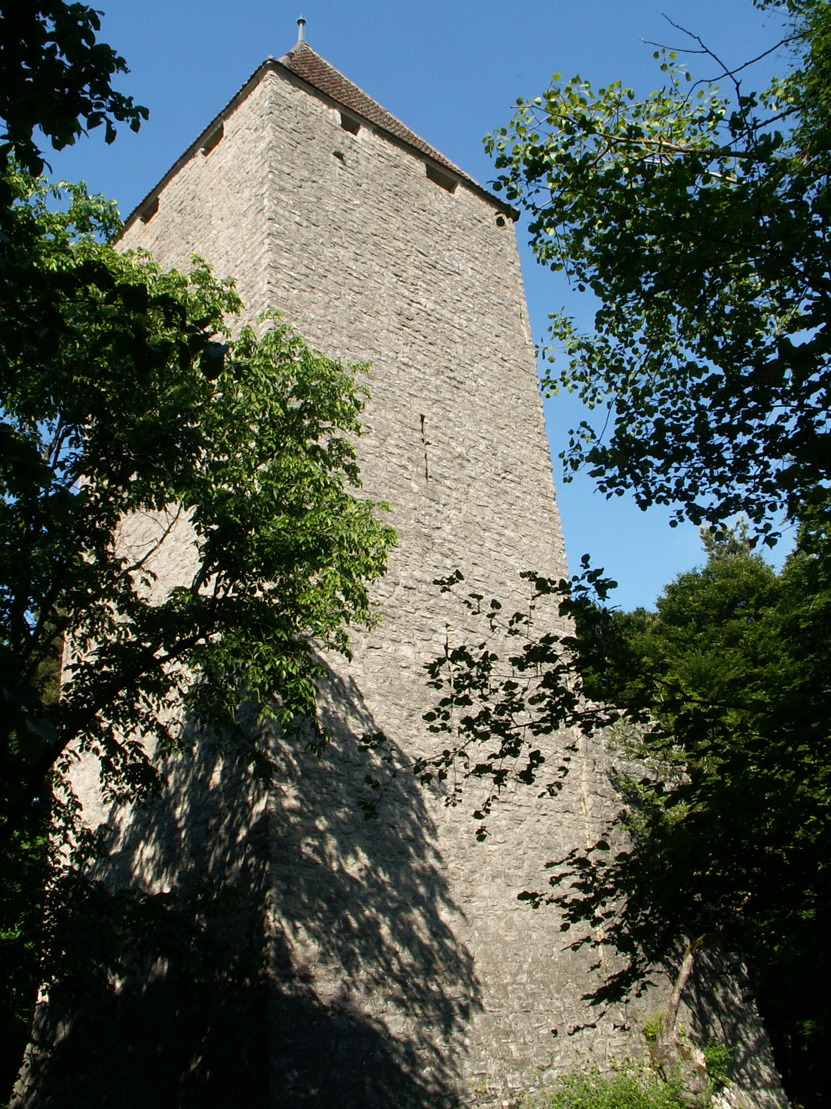 Cette tour est le seul vestige d’un château datant du Moyen-Age située sur la commune de Murist dans le canton de Fribourg en Suisse